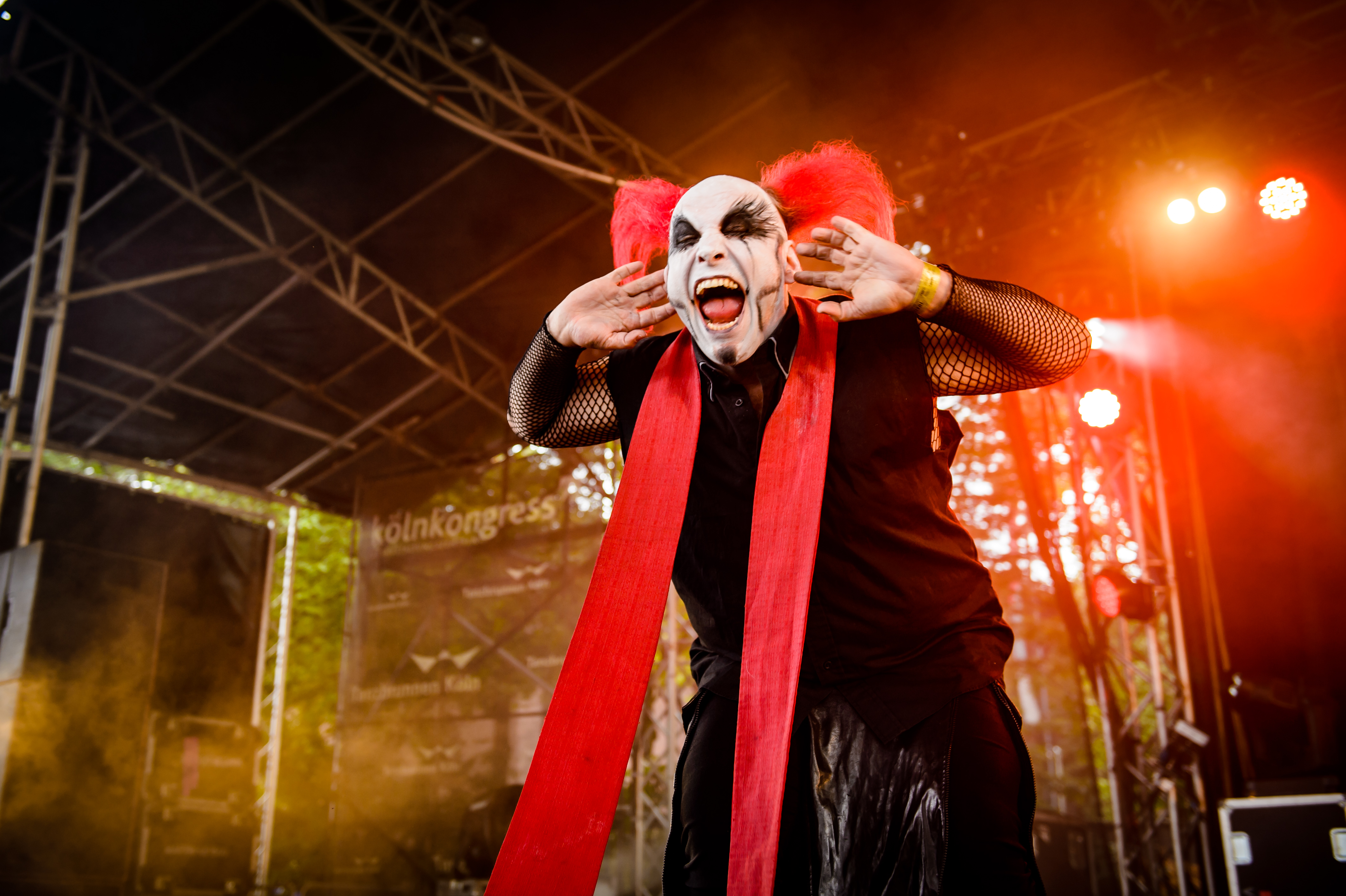 'Amphi Festival 2017; Tanzbrunnen Köln': 'Das Ich'